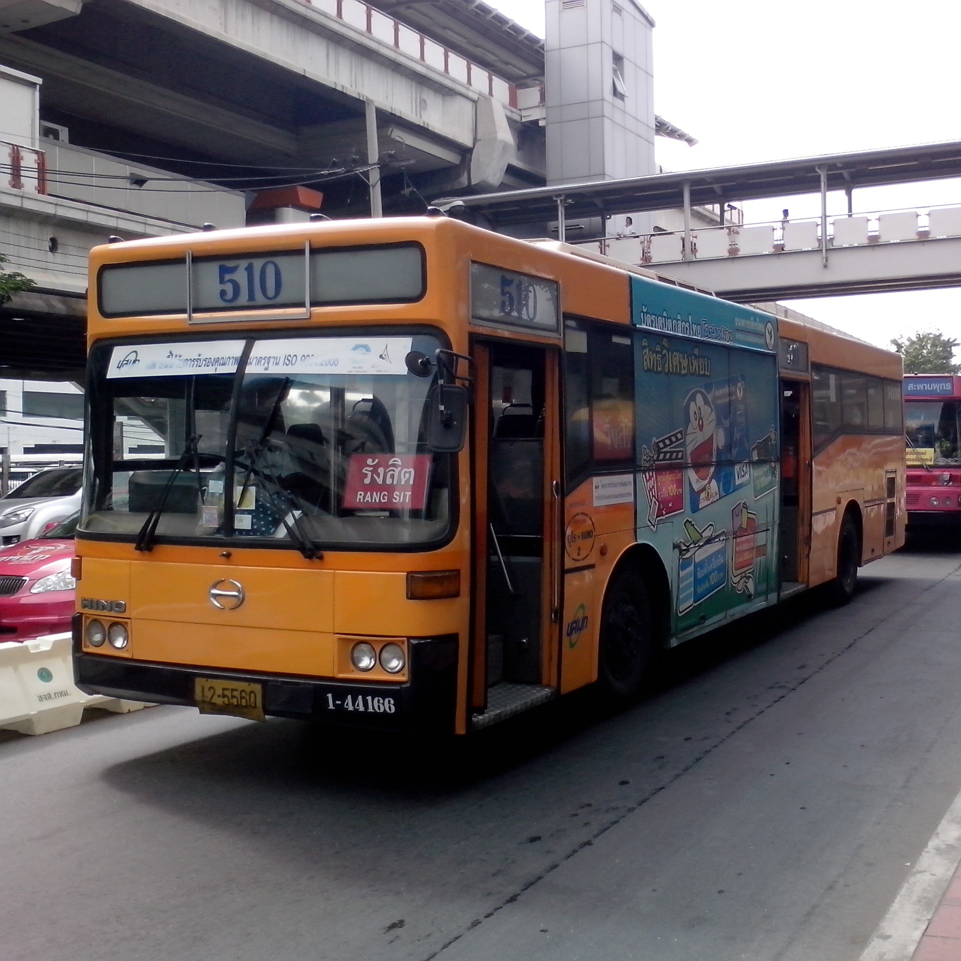 bus no.1-44166